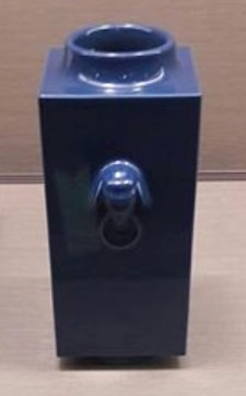 攝於台北故宮博物院